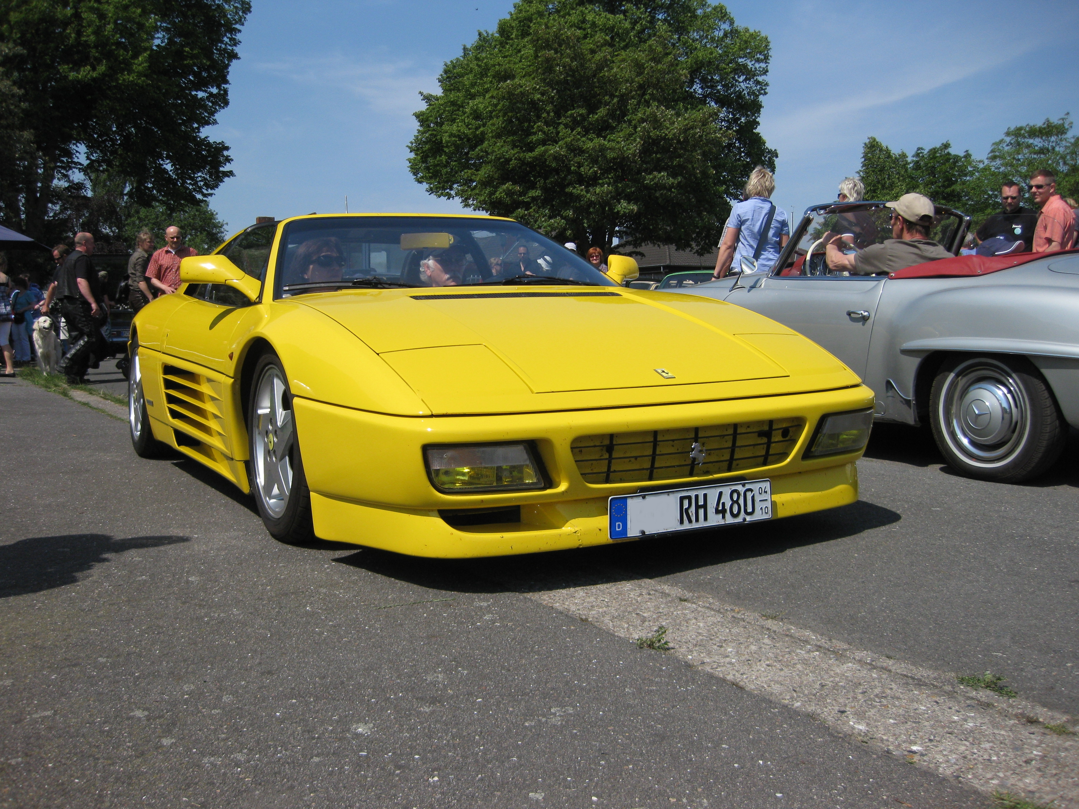 Ferrari 348tx in gelb Frontansicht